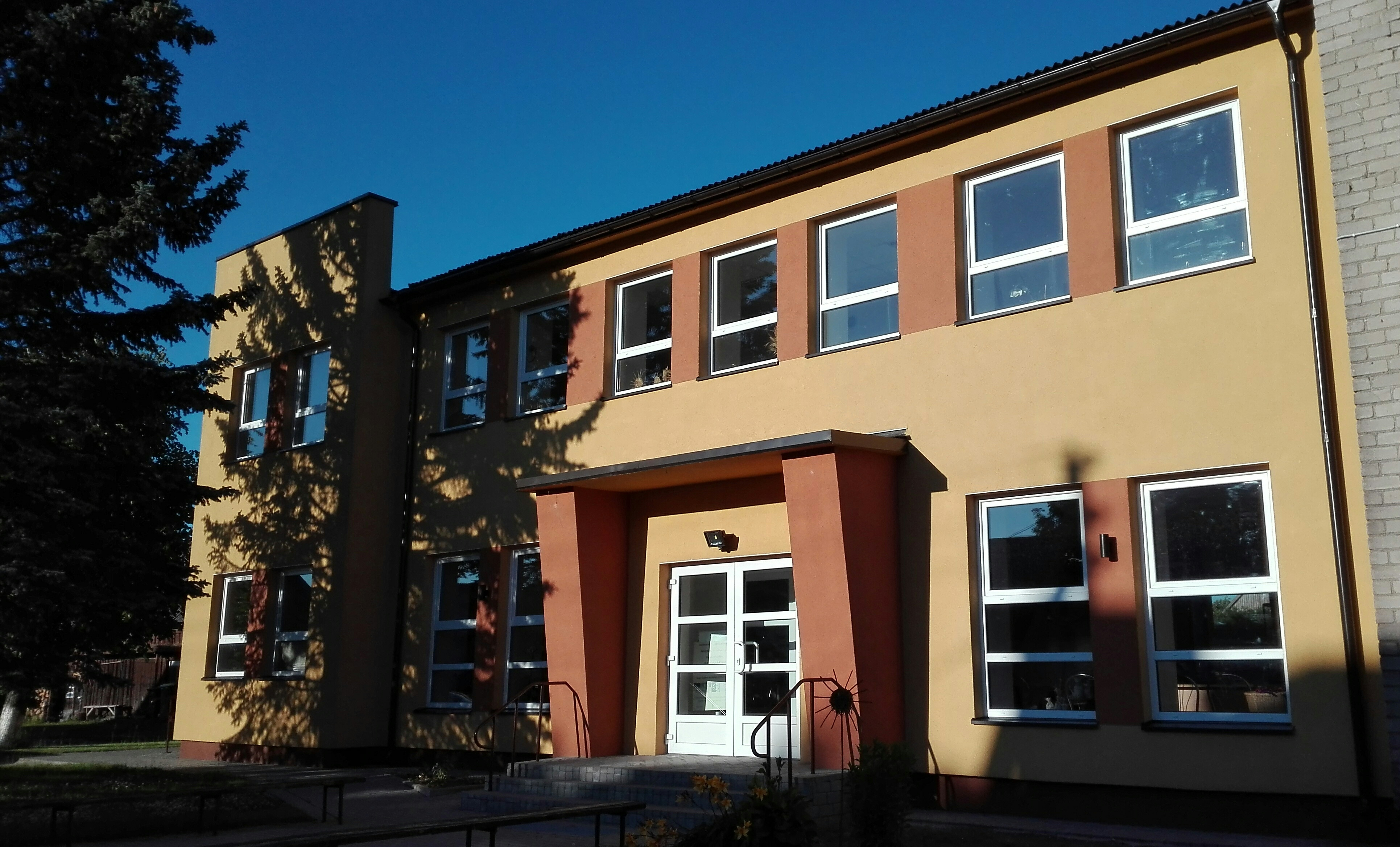 Klaipėdos rajono amatų centras Veiviržėnuose